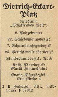 Hauseigentümer Dietrich-Eckart-Platz 1, Siedlung Schaffendes Volk, Adressbuch der Stadt Düsseldorf 1938 – nach 1945 Albrecht-von-Hagen-Platz